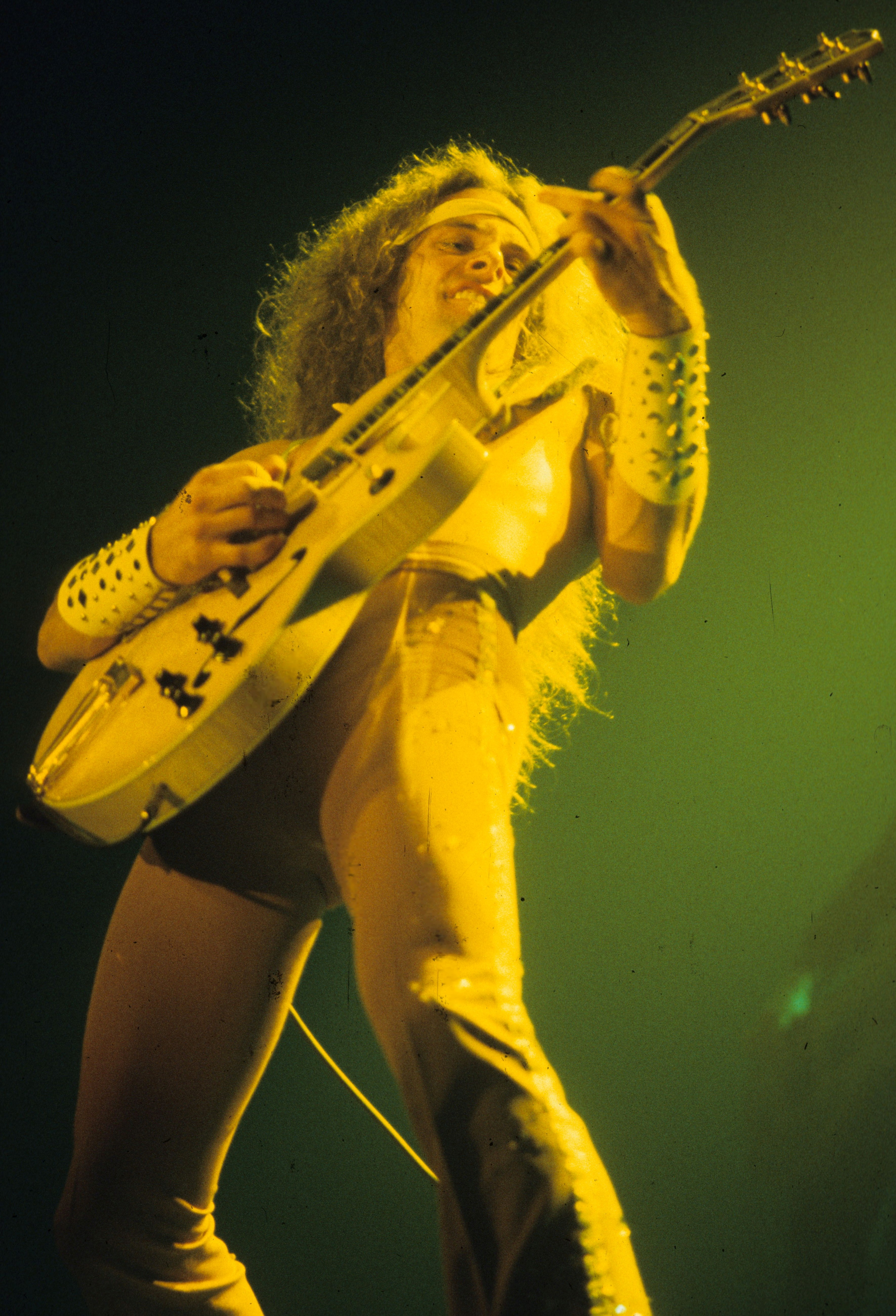 Ted Nugent performing